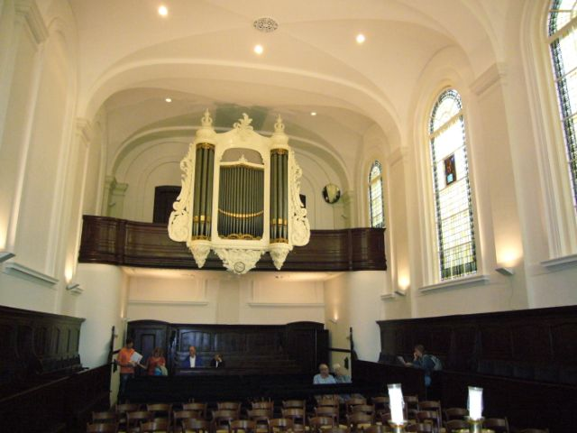 Interieur Doopsgezinde kerk Utrecht